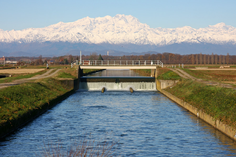 La Roggia Mora a San Bernardino, frazione di Briona (NO), poco più a valle del suo passaggio sopra il Diramatore Alto Novarese.